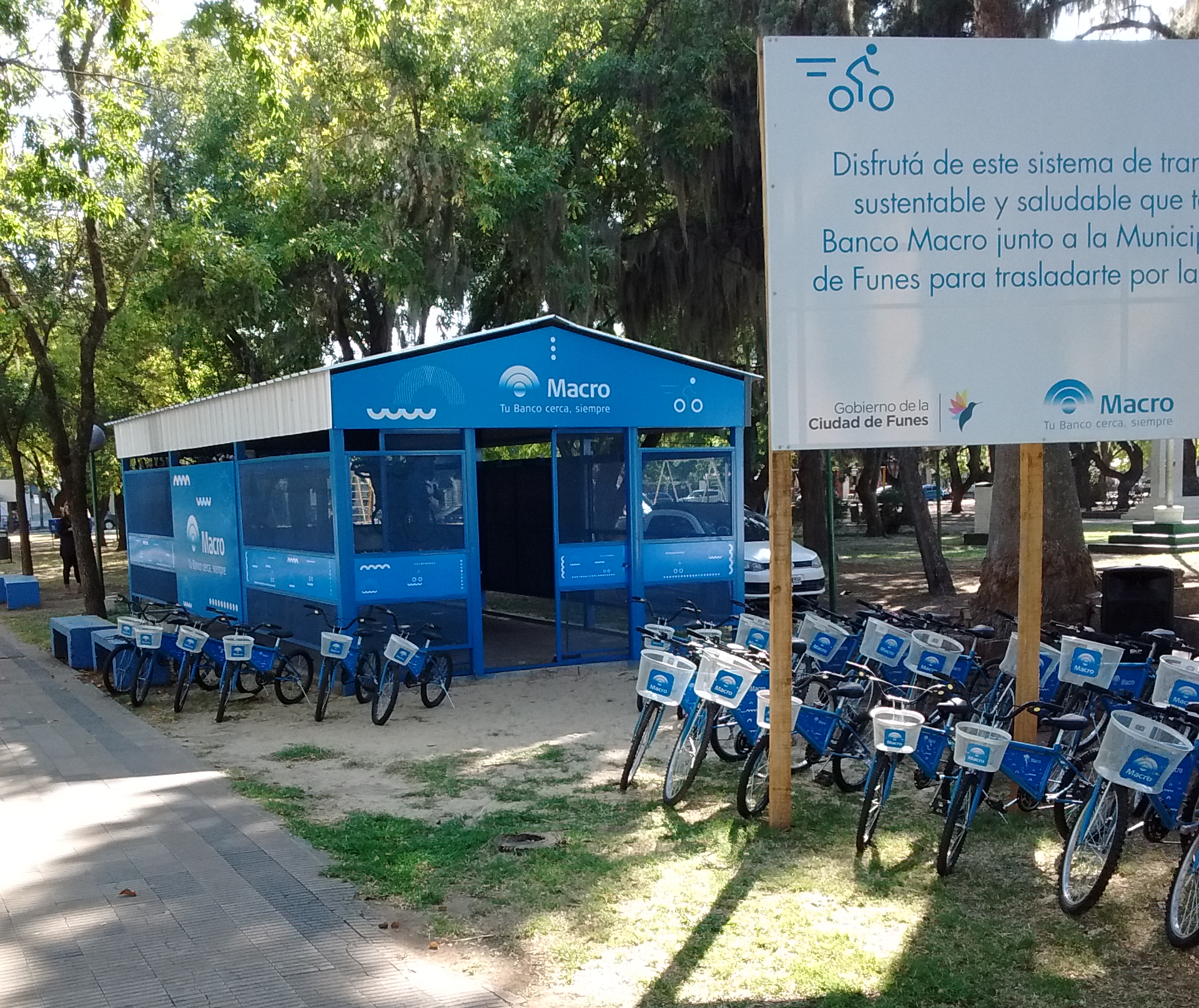 Vista de la caseta de bicicletas públicas en Funes, el día de su inauguración.